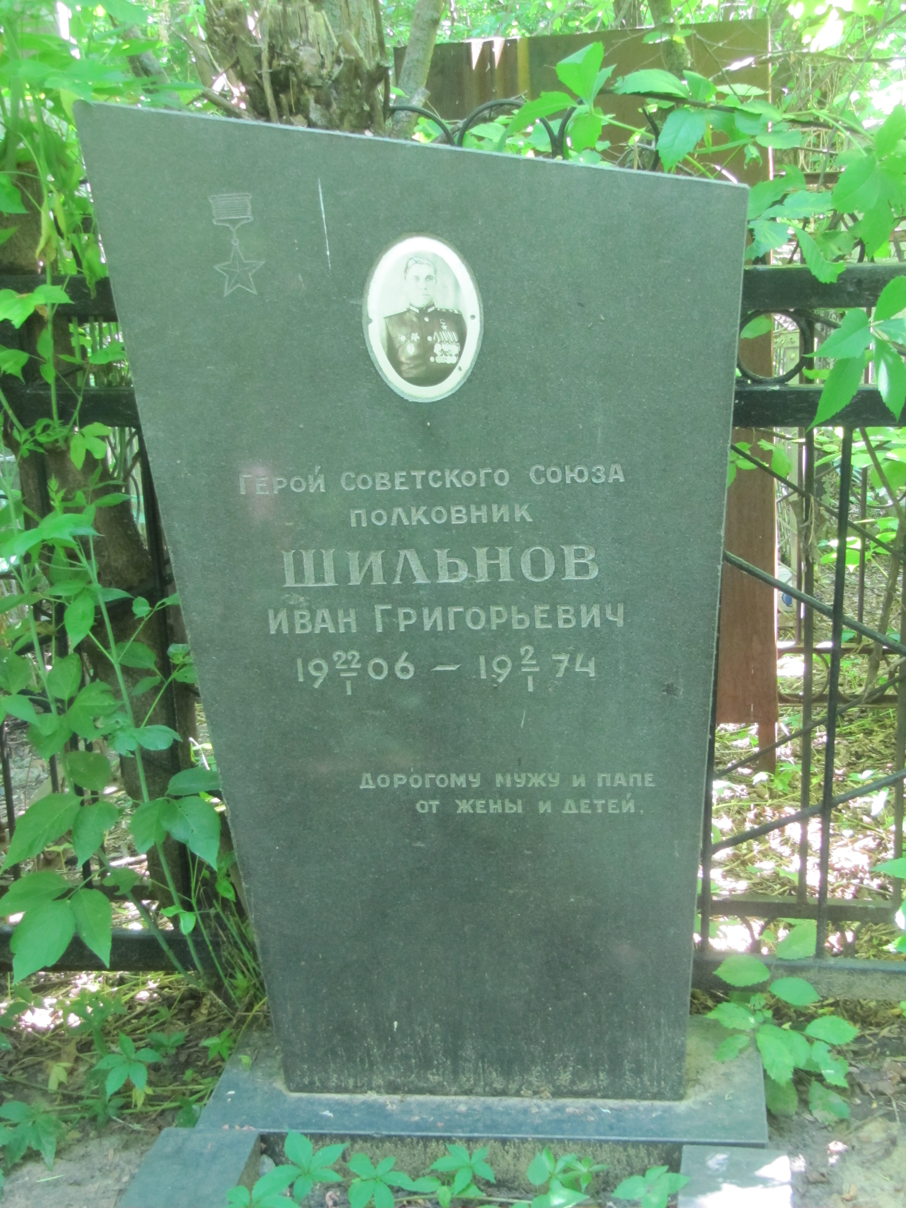 Могила Шильнова И.Г. (1906-1974), Героя Советского союза: Воскресенское кладбище, Саратов, Саратовская область.